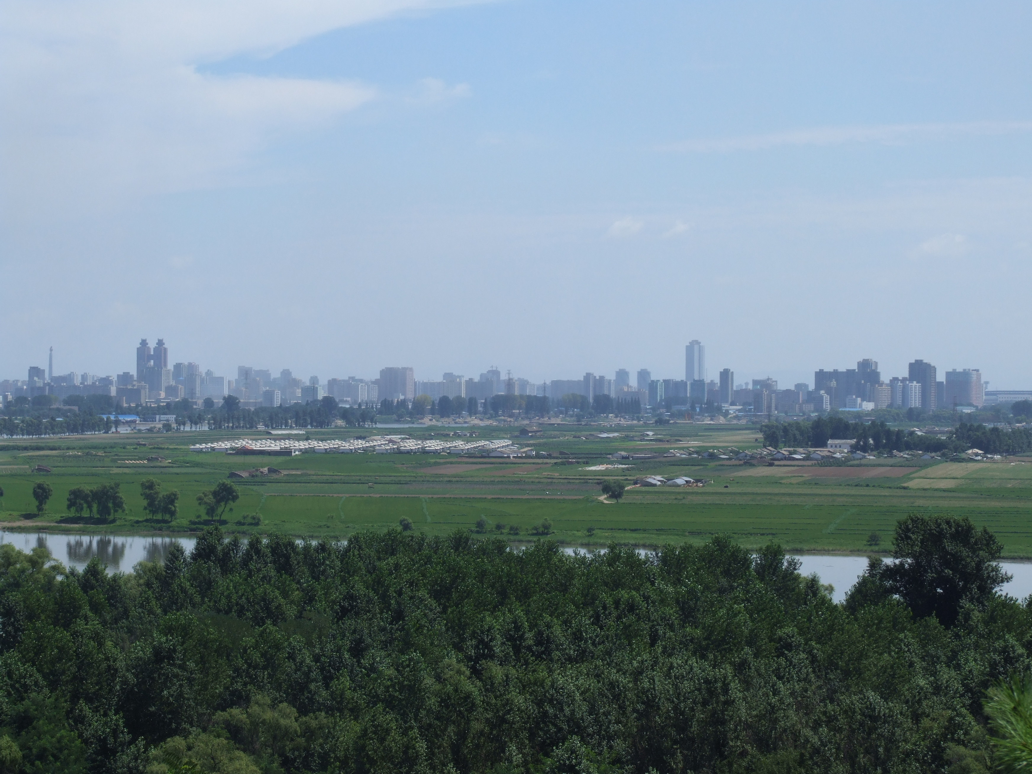 Auf dem Mangyong-Hügel in Mangyŏngdae